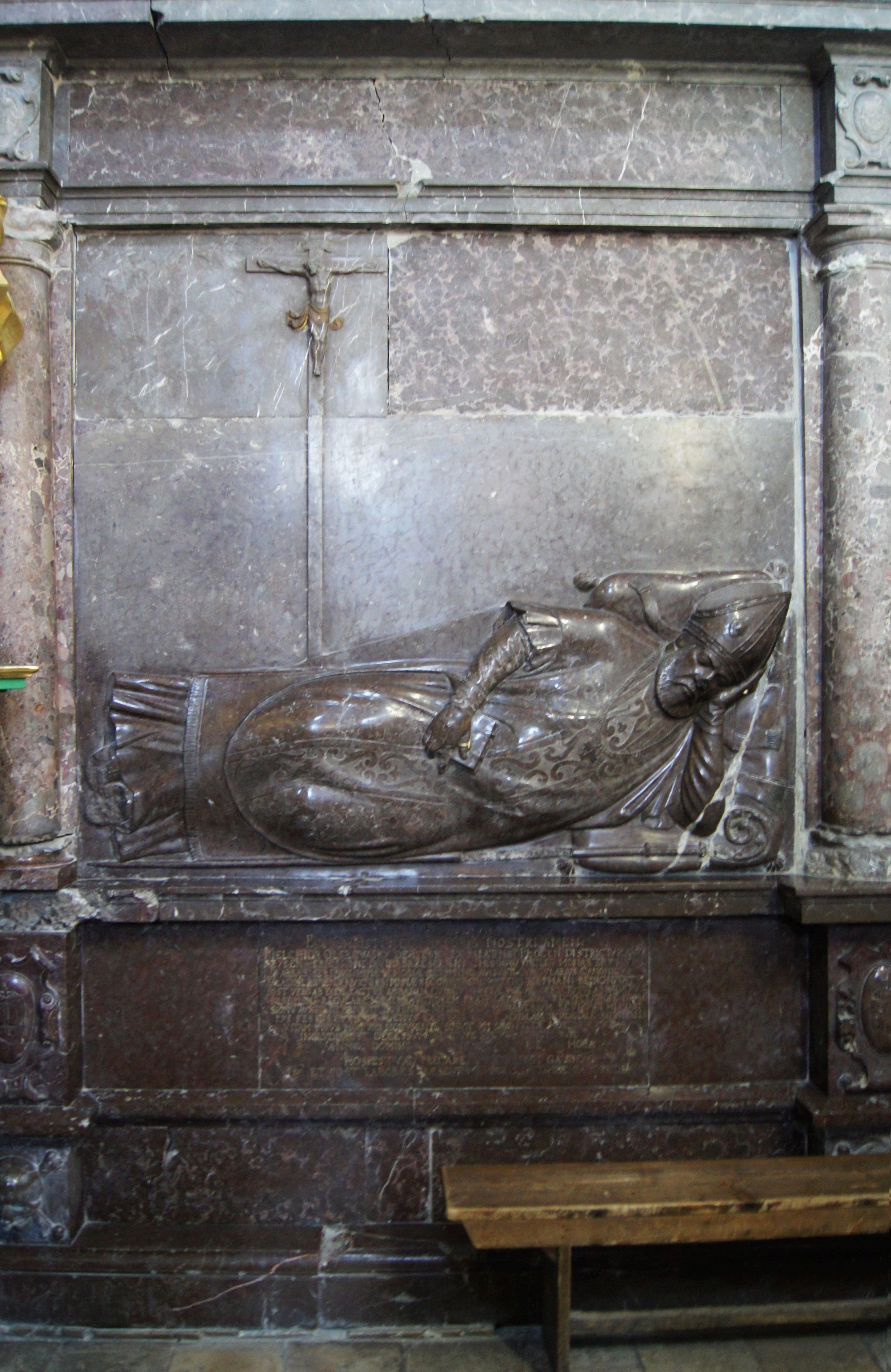 Renesansowy nagrobek opata Melchiora Olszewskiego w kościele norbertanów w Hebdowie